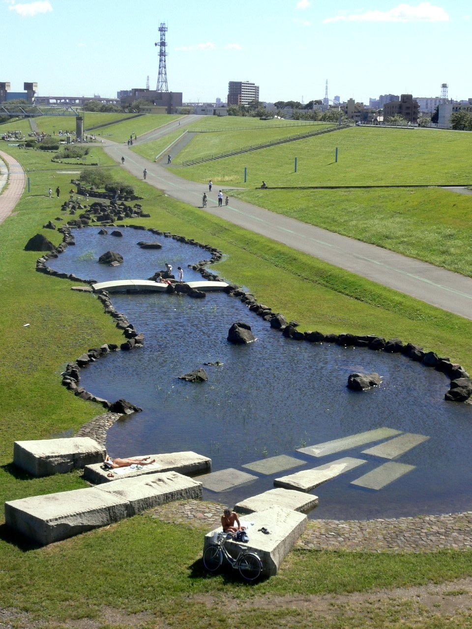 新荒川大橋より撮影（川口市と赤羽の中間地点） 歩道側から撮影